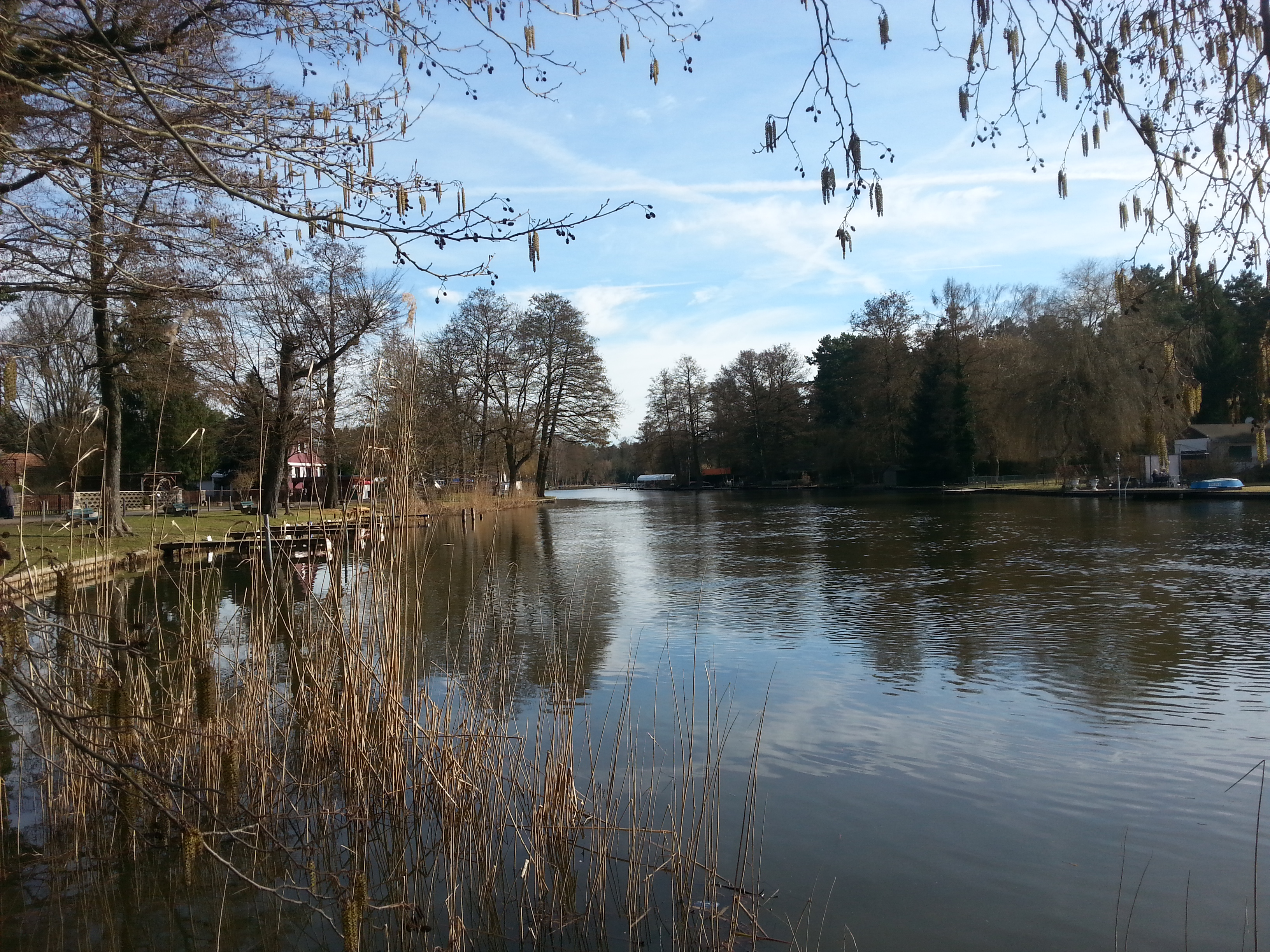 Die Dahme zwischen Dolgenbrodt und Friedrichsbauhof.